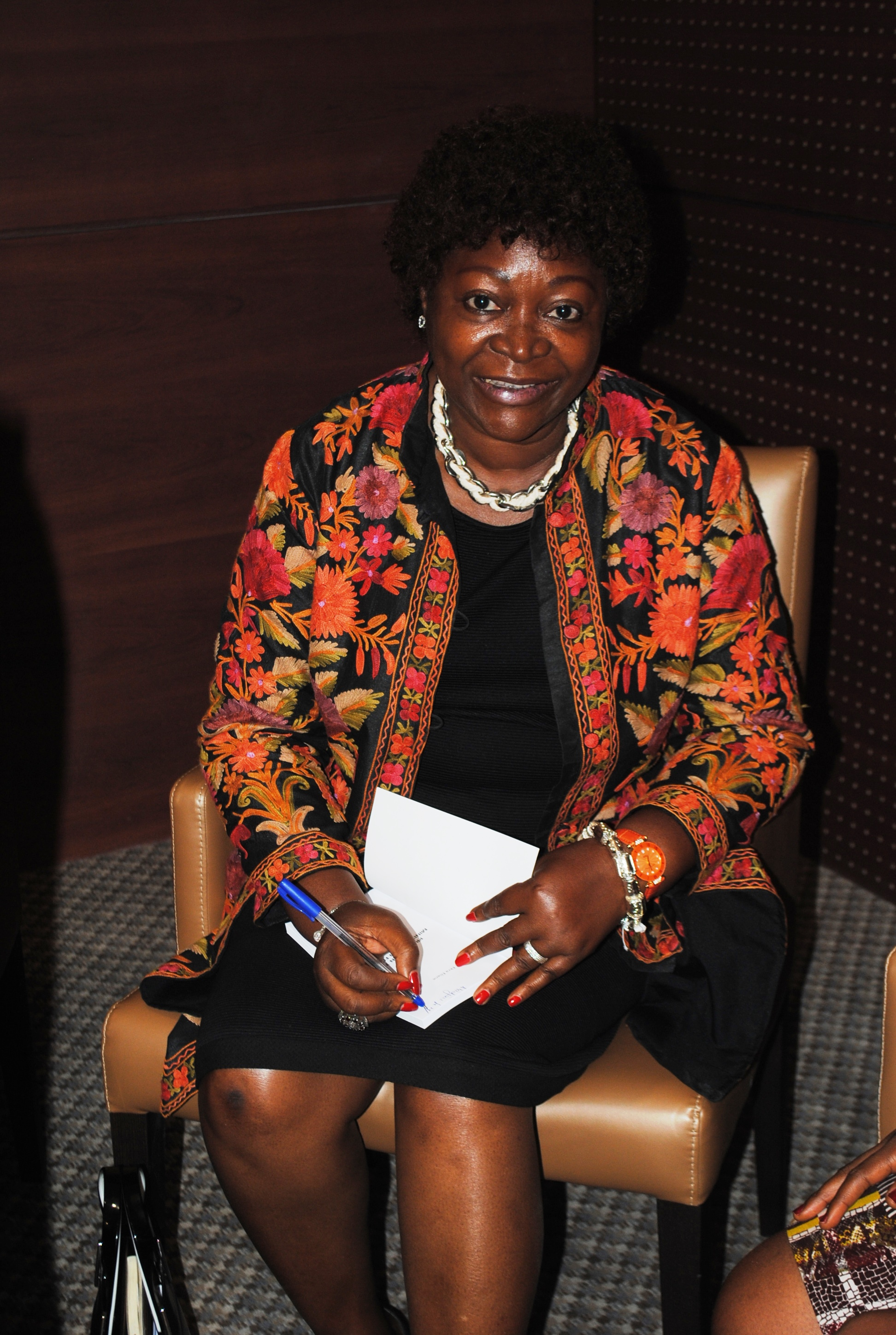 Dr Eliane Ekra